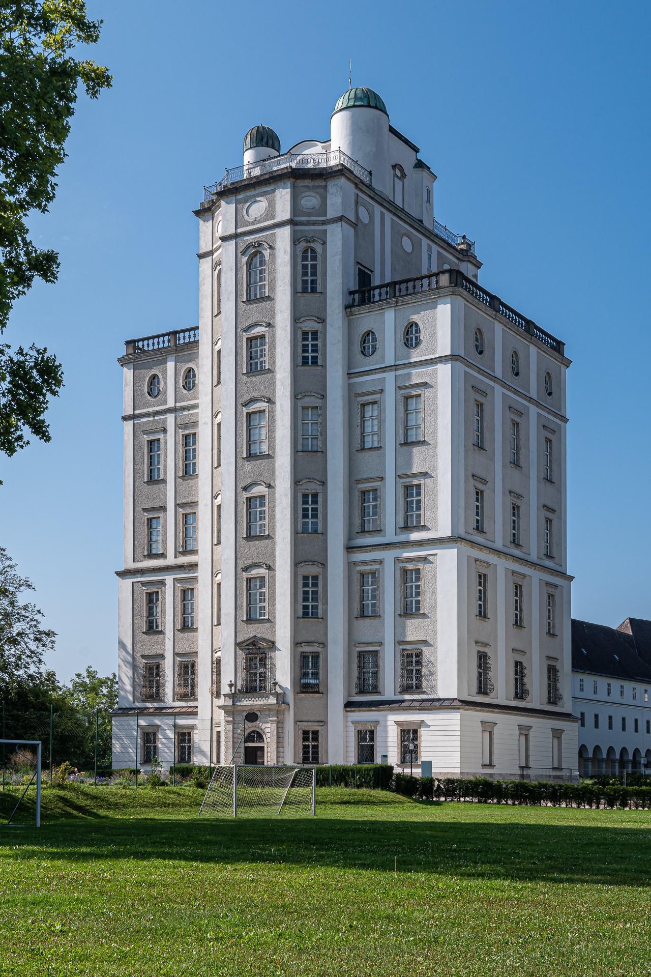 Die Sternwarte Kremsmünster in Oberösterreich (Specula cremifanensis) gehört zu den bedeutendsten historischen Observatorien der Welt. Sie gehört zur denkmalgeschützten Gesamtanlage des Stifts, und wurde von der Internationalen Astronomischen Union zum Outstanding Astronomical Heritage erklärt. 'Kremsmünster Observatory' (Q1776351)